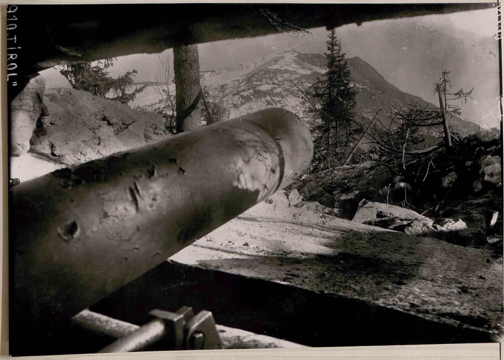 Batterie Corte am Cherz im Cherzwalde, Schussrichtung Monte Sief - Col di Lana.